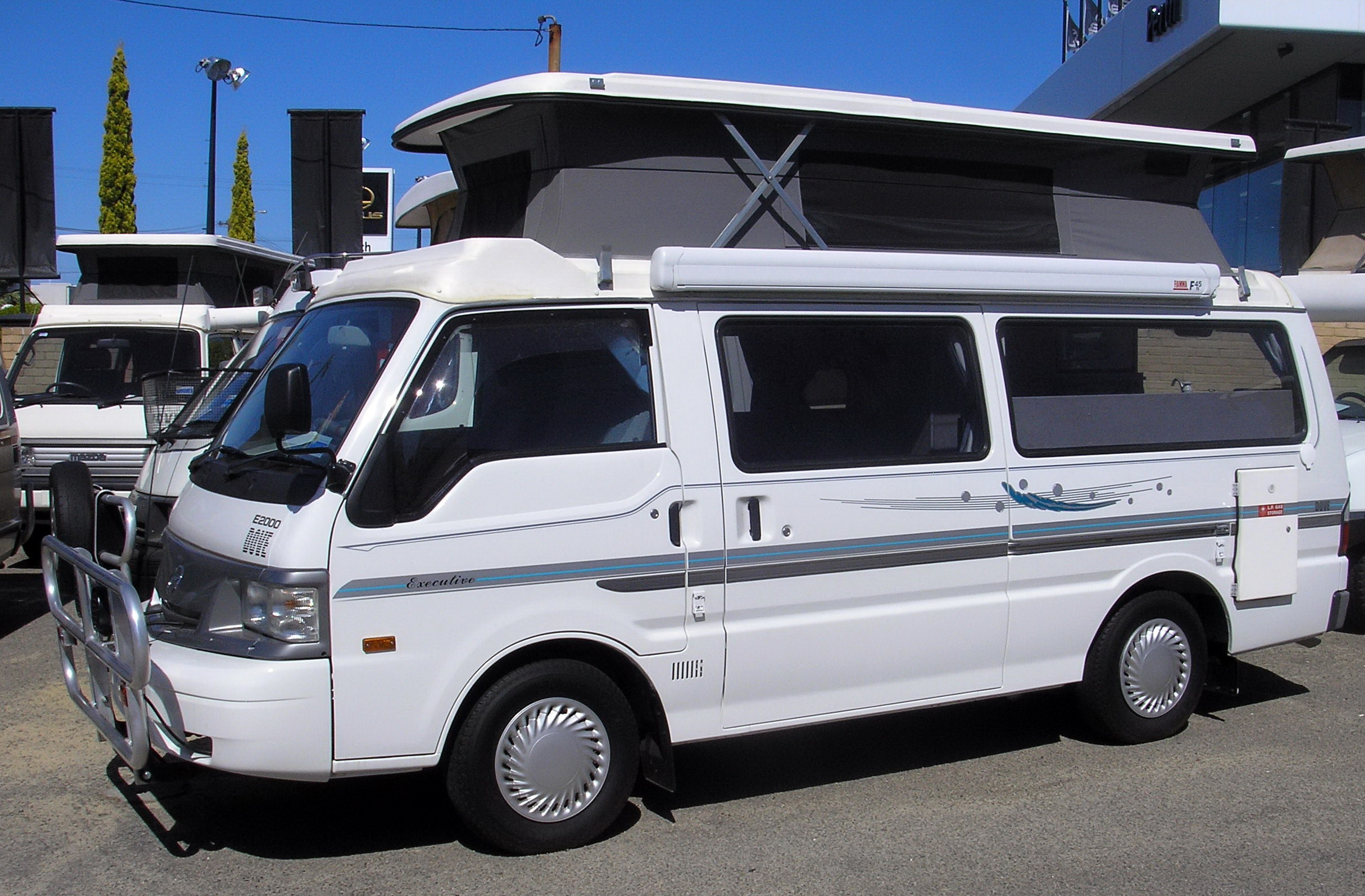 Mazda E2000 LWB campervan